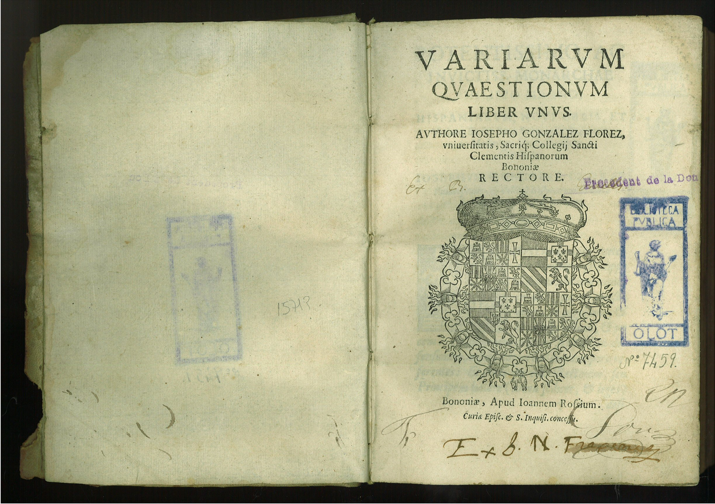 Variarum Quaestionum